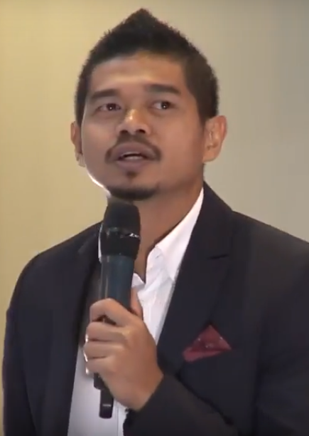 Bambang Pamungkas dalam acara bedah buku "BEPE20 PRIDE" di Kemsetneg.